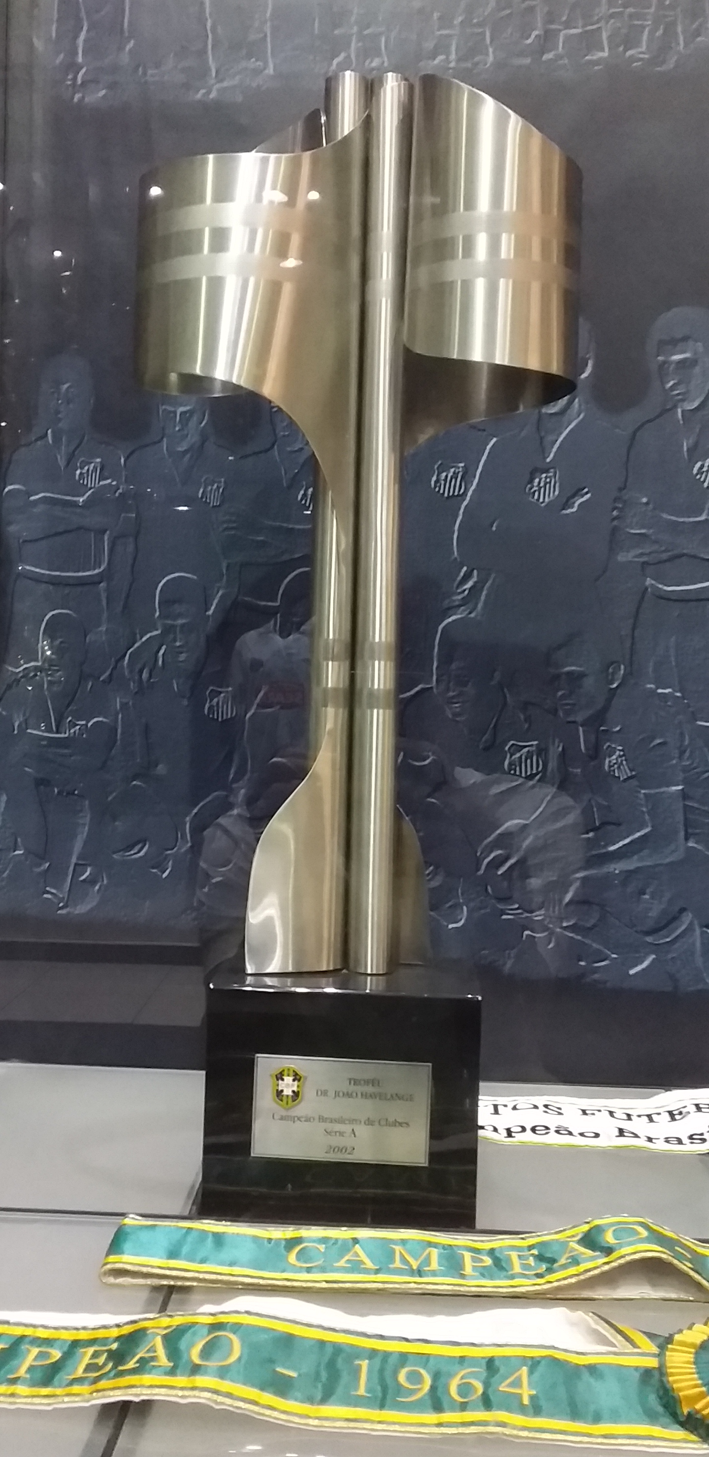 Troféu do Campeonato Brasileiro de 2002 conquistado pelo Santos FC exposto no Memorial das Conquistas.